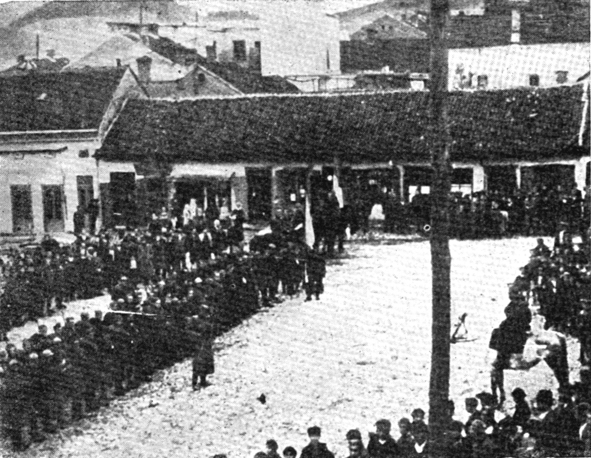 Srpskohrvatski / српскохрватски: Zbor Užičkog Radničkog bataljona pred odlazak u svoju poslednju borbu na Kadinjači.